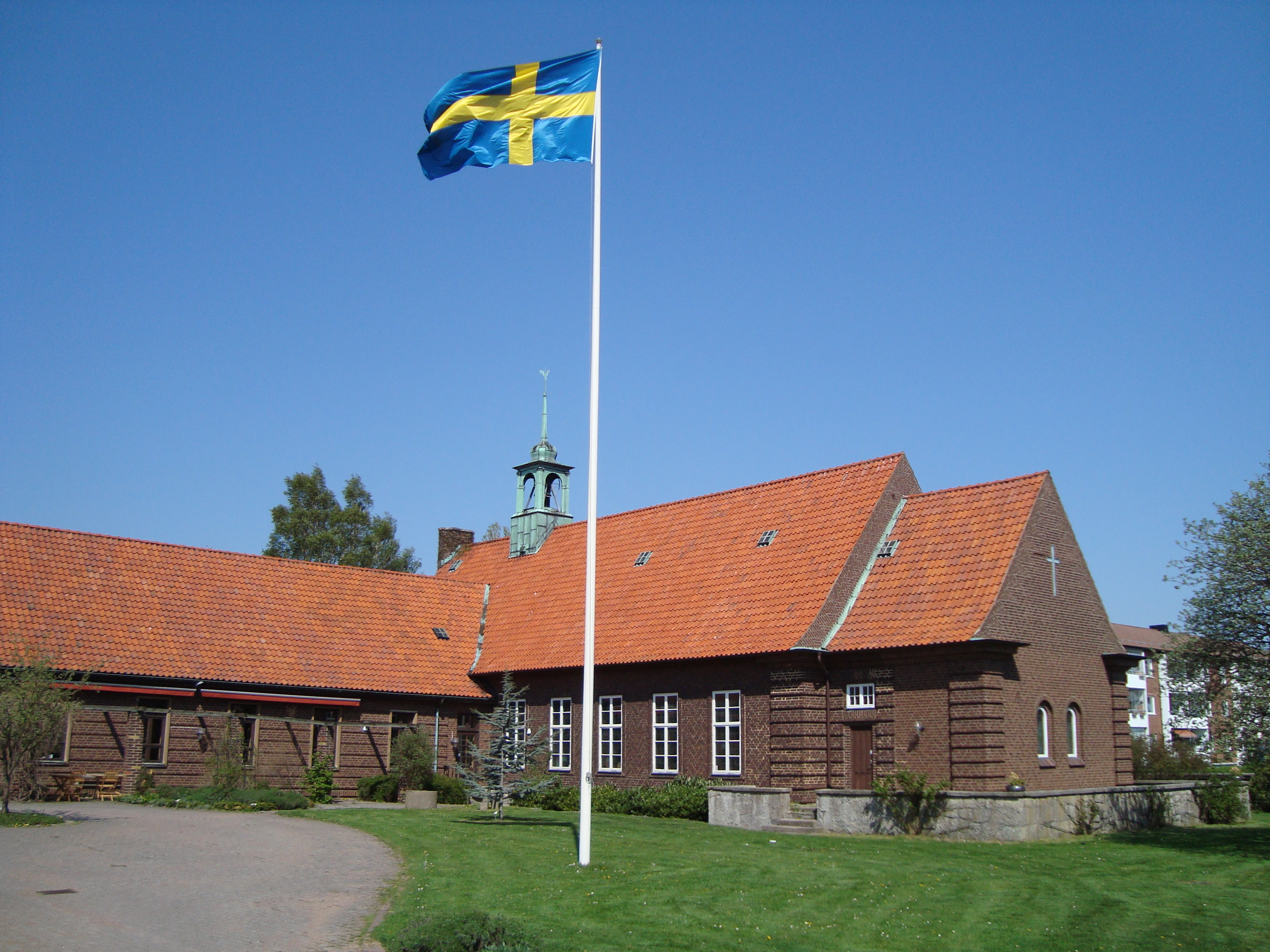 Allhelgonakyrkan på Råå i Helsingborg.